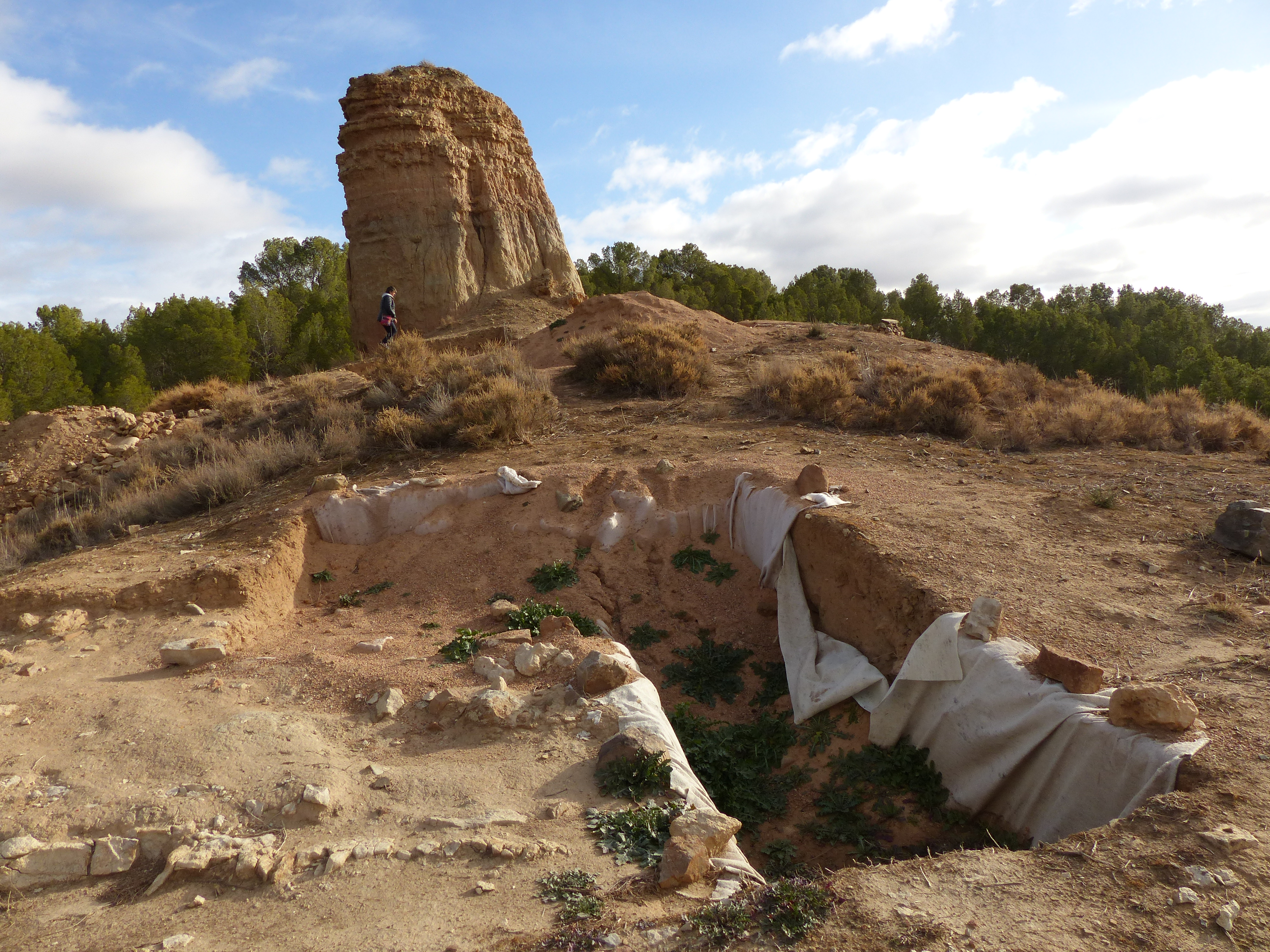 Trabajos de excavación del Castillo de Alcocer